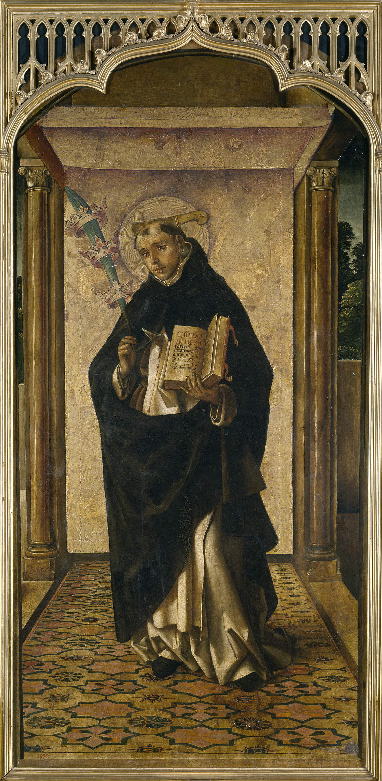 La obra representa a San Pedro de Verona (1205-1252), conocido también como San Pedro Mártir.